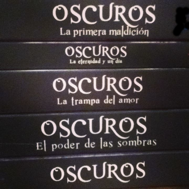 Los nombres de los cinco libros de la saga Oscuros.